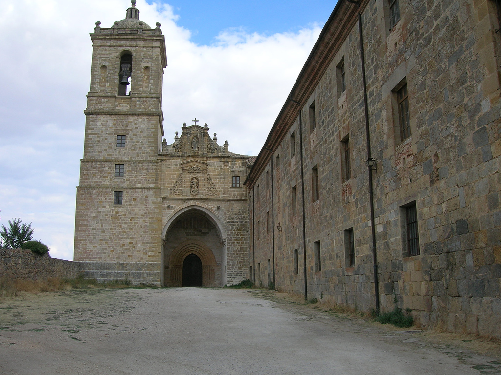 El Monasterio de Irache se encuentra en la localidad de Ayegui. Justo en frente, se encuentra la fuente del vino de Bodegas Irache. Vuela hasta esta localización (Necesitas Google Earth)